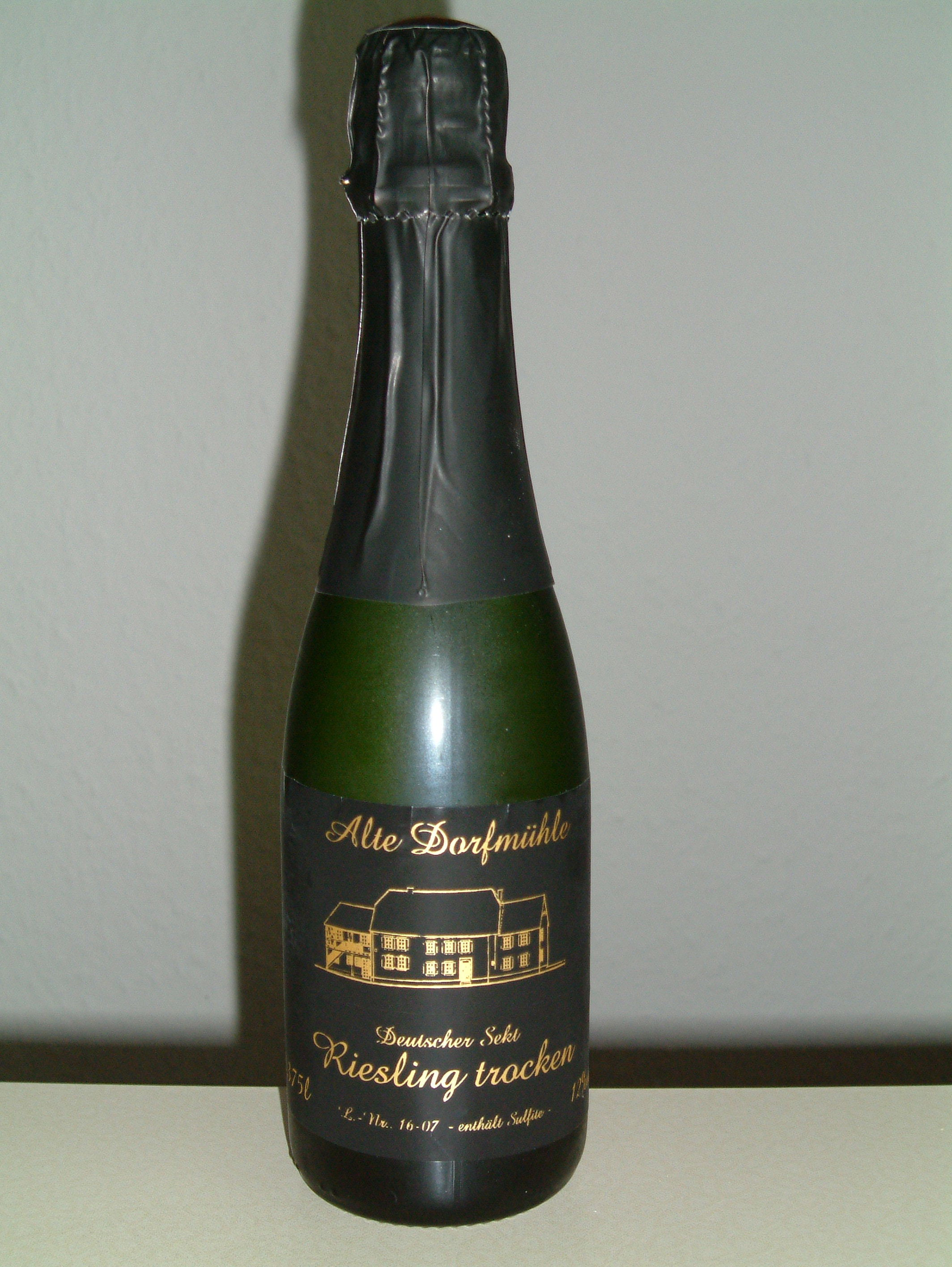 Rieslingsekt, Sonderedition "Alte Dorfmühle" anlässlich der Einweihung der Dorfmühle (Großkarlbach) am 2007-06-22